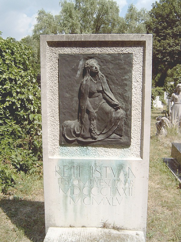 Réti István (Nagybánya, 1872. dec. 16. – Bp., 1945. jan. 17.) festő sírja Budapesten. Kerepesi temető: 34-2-29 [szobrász: Ferenczy Béni].